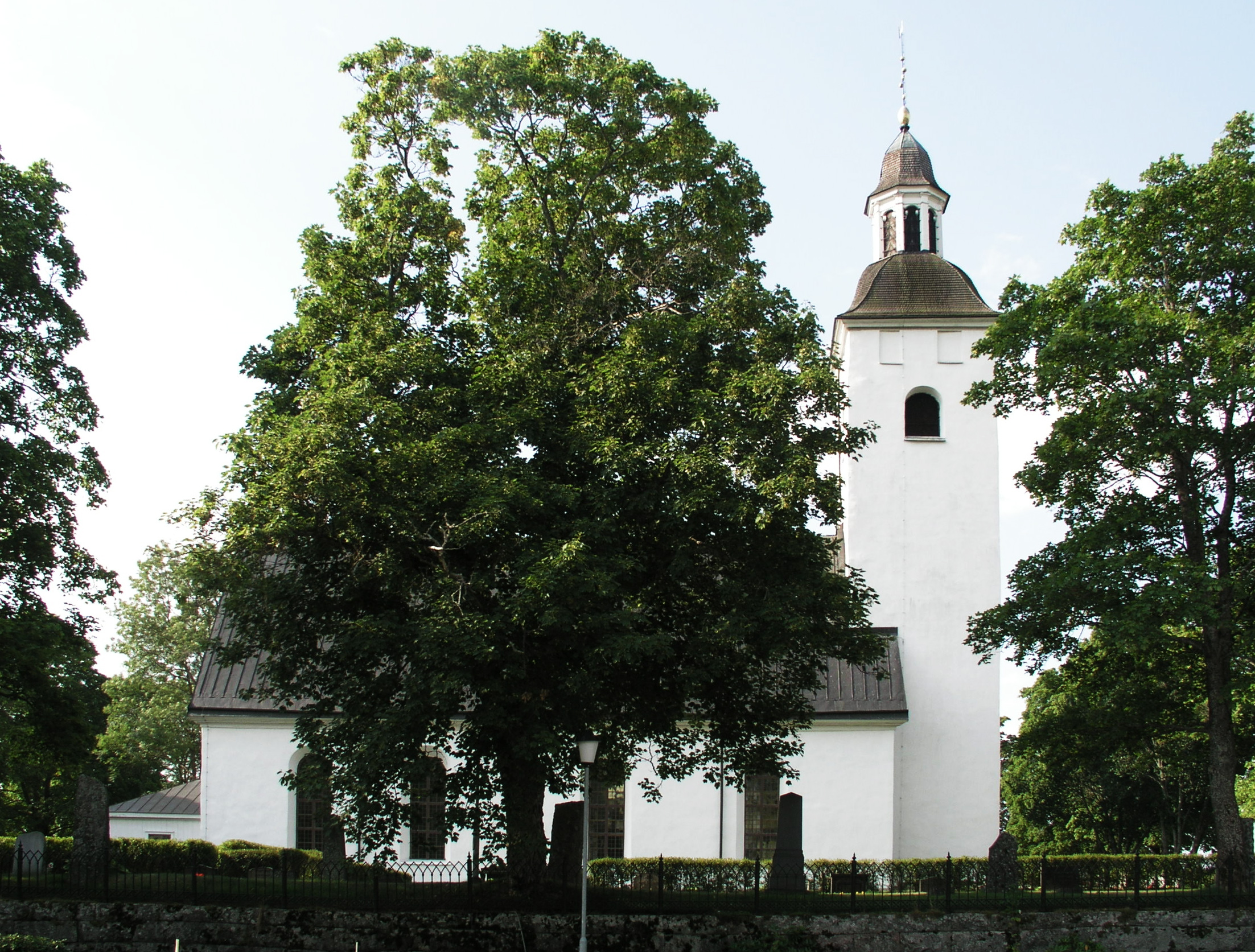 Hälsingtuna church, Diocese of Uppsala, Hudiksvalls kommun.